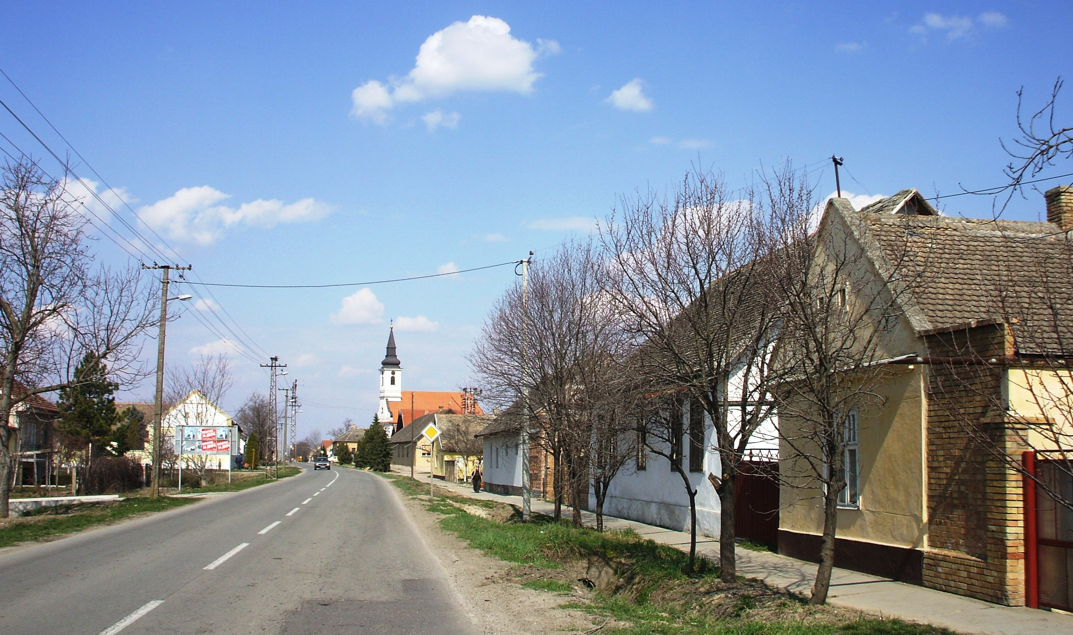 Главна улица у Раткову.